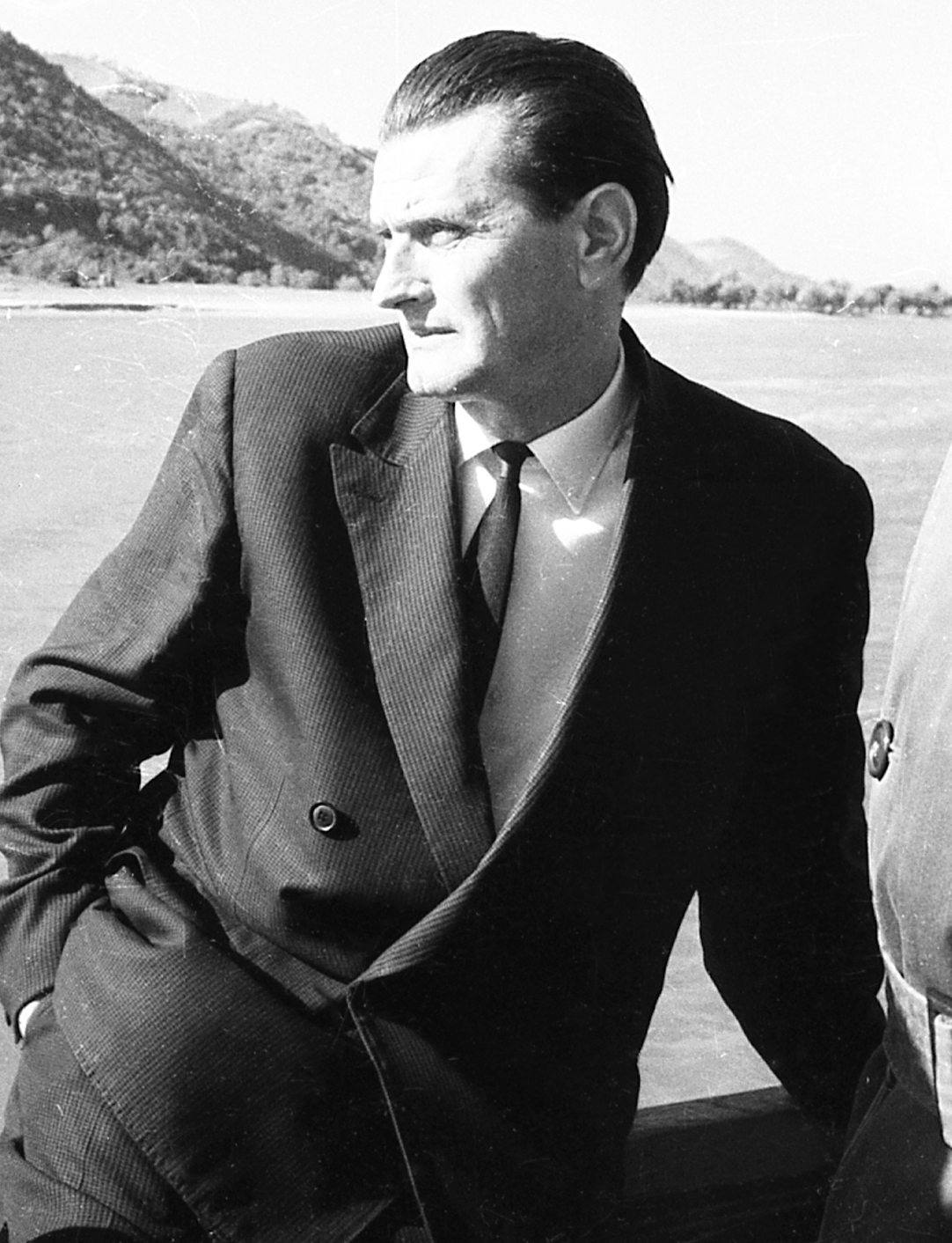 Srpski (latinica): dr Miloš Žanko (Split, 1915 — Beograd, 24. januar 2000), učesnik Narodnooslobodilačke borbe i društveno-politički radnik SFR Jugoslavije i SR Hrvatske.